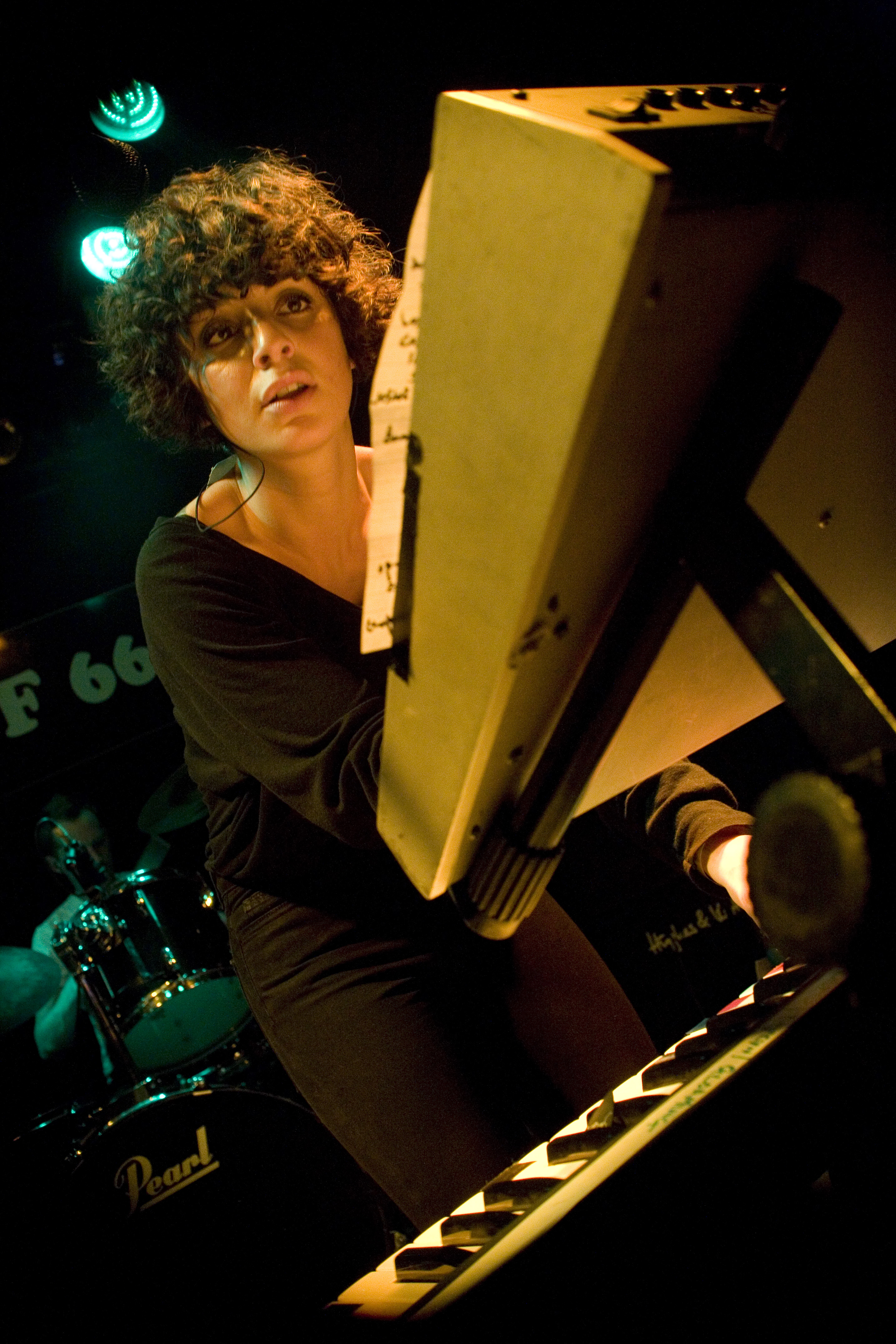 @Spirit of 66 (Verviers) - 2008